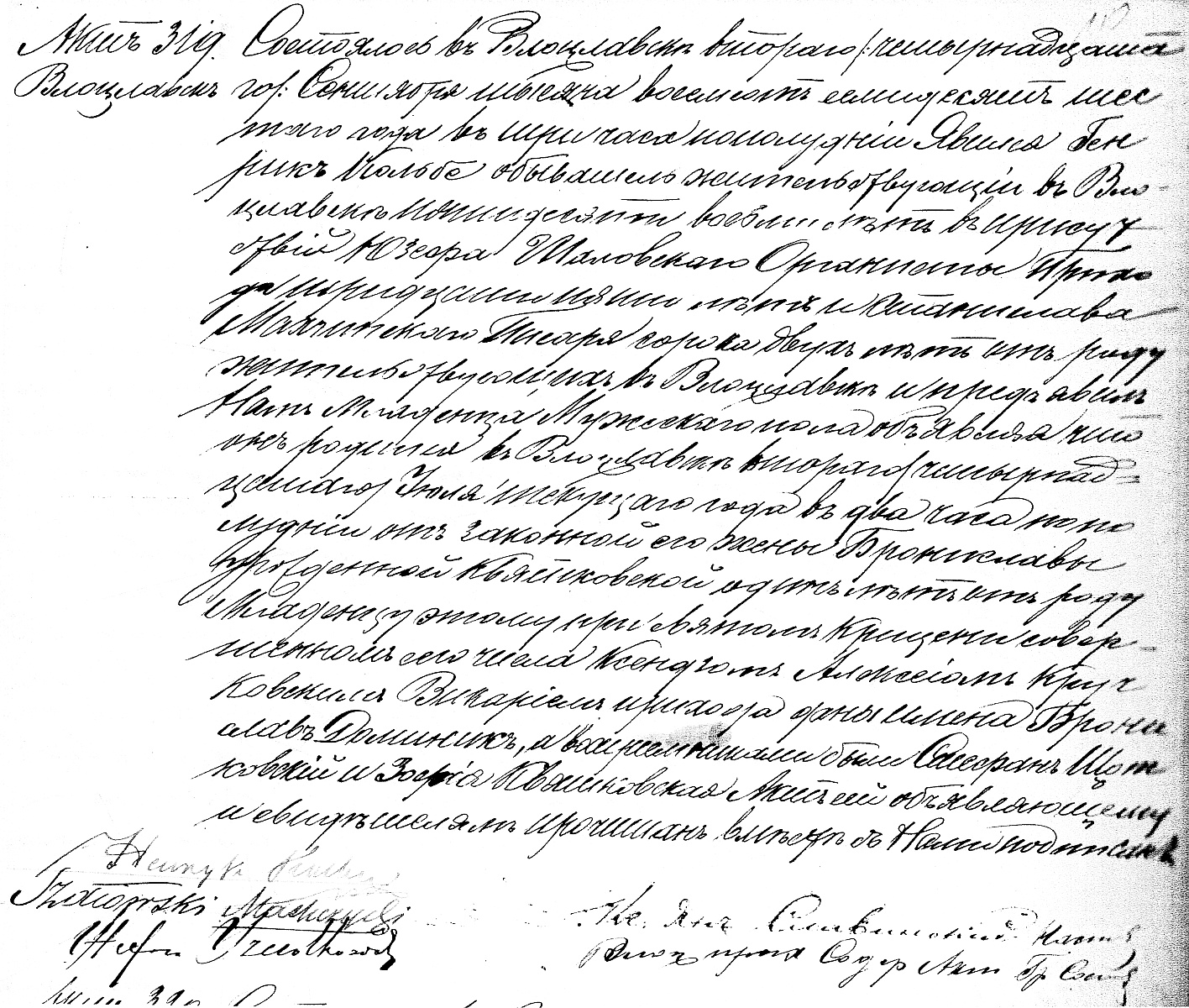 Odpis aktu chrztu Bronisława Dominika Kolbe (syna Henryka Kolbe i Bronisławy Gabrieli z domu Kwiatkowskiej), ur. 14.7.1876 we Włocławku. Rodzicami chrzestnymi byli Stefan Szczotkowski (ojciec Zygmunta Szczotkowskiego) i Zofia Kwiatkowska